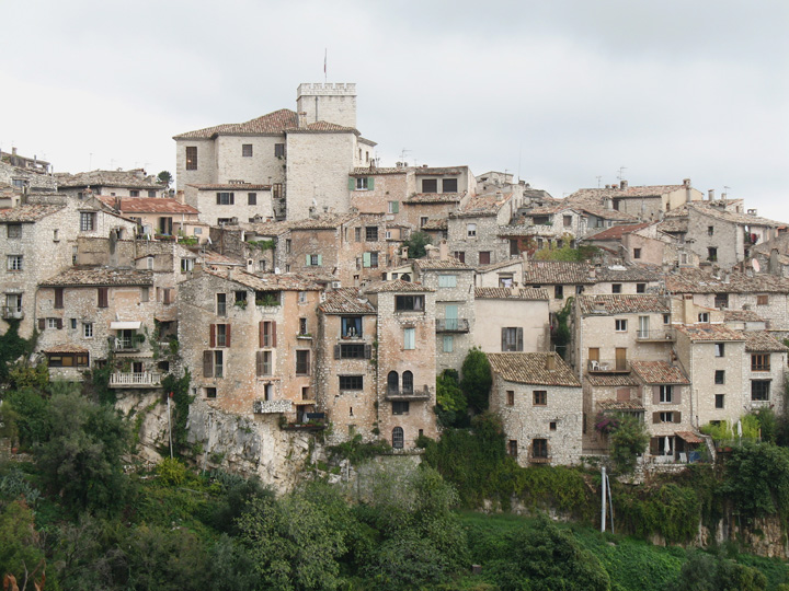 Tourrettes-sur-Loup, Alpes-Maritimes, France